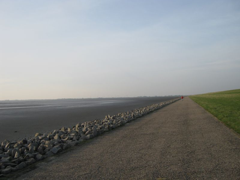 Abschnitt der North Sea Cycle Route an der Meldorfer Bucht (Schleswig-Holstein), Variante an der Außenseite des Deiches, ganz im Hintergrund links ist Büsum zu erahnen.